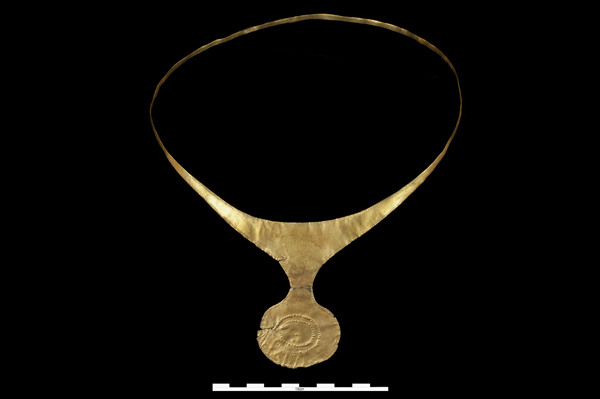 Diadema de oro del Bronce Antiguo-Medio. Se desconoce el contexto arqueológico exacto aunque se sabe que procede de un yacimiento argárico, el Estrecho de la Encarnación (Caracava de la Cruz, Murcia) probablemente de una de sus sepulturas. Es la única pieza de oro conocida en el mundo argárico de estas características. Diámetro: 17,70 cm; grosor: 0,02 cm; peso: 44,40 gr. Nº Inv. 33114. Museo Arqueológico Nacional de España.